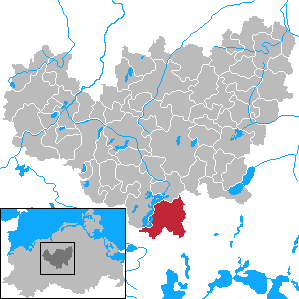 Dobbin-Linstow in Mecklenburg-Vorpommern - District Güstrow